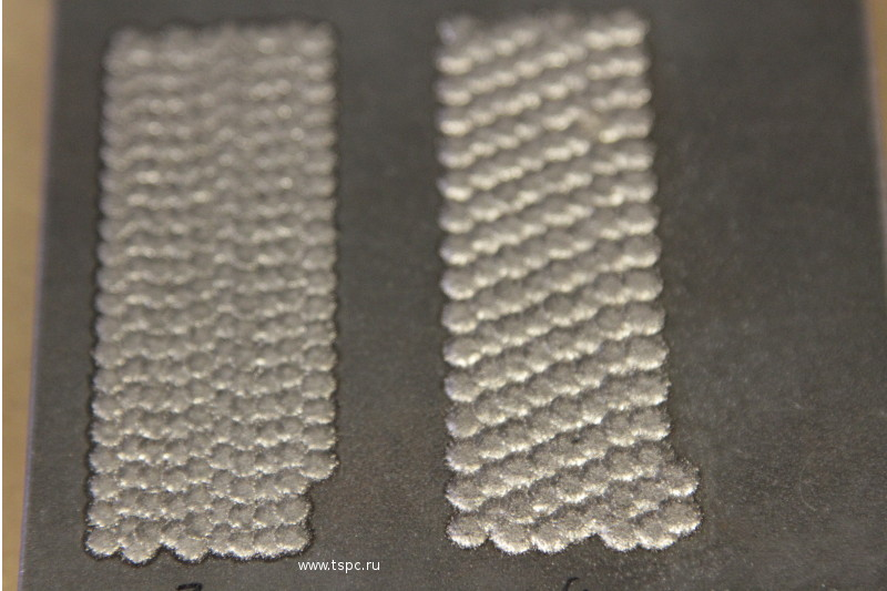 Роботизированная лазерная наплавка в импульсном режиме